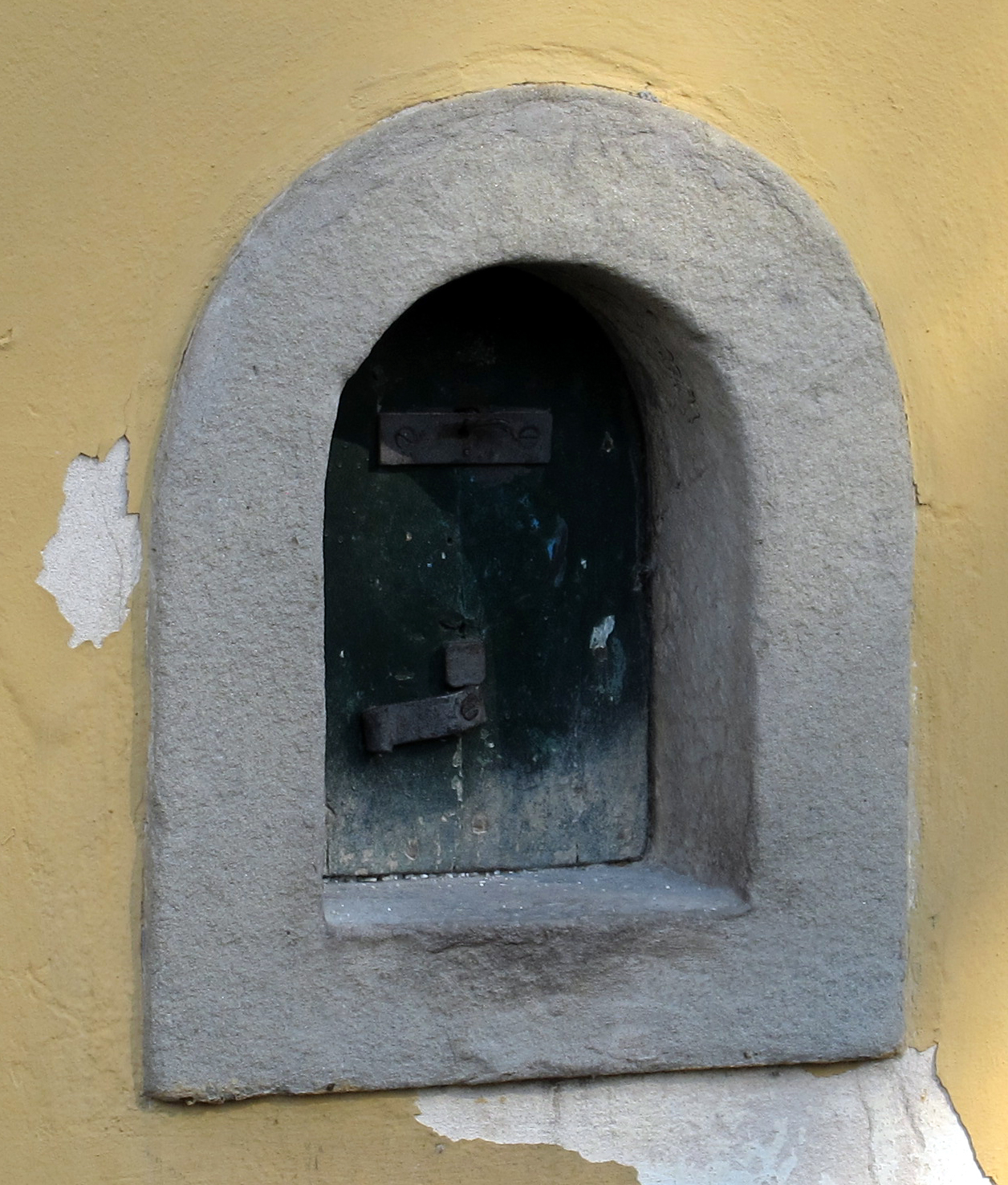 Palazzina Pontenani 04 buchetta del vino